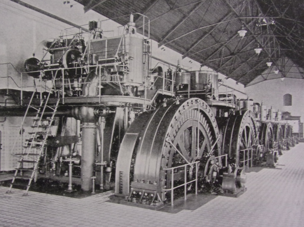 Innenansicht der Dynamohalle des Kraftwerks Tullnau 1899